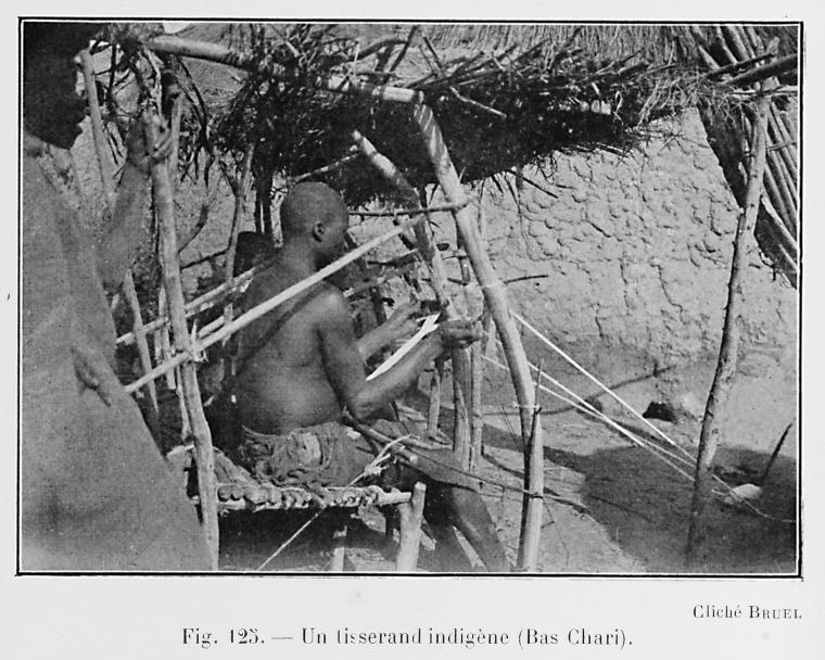 Weaver in the Lower Chari region of French Equatorial Africa. From L'Afrique Équatoriale Française: le pays, les habitants, la colonisation, les pouvoirs publics. Préf. de M. Merlin. Avec 186 reproductions photographiques, 33 diagrammes, profils, et 7 cartes dont 5 en couleurs, (published 1918).